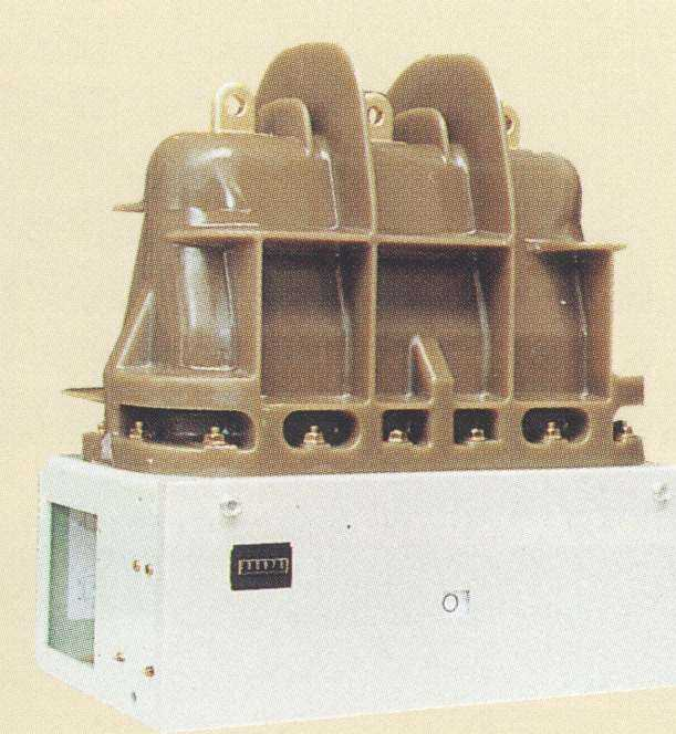 Medium voltage contactor